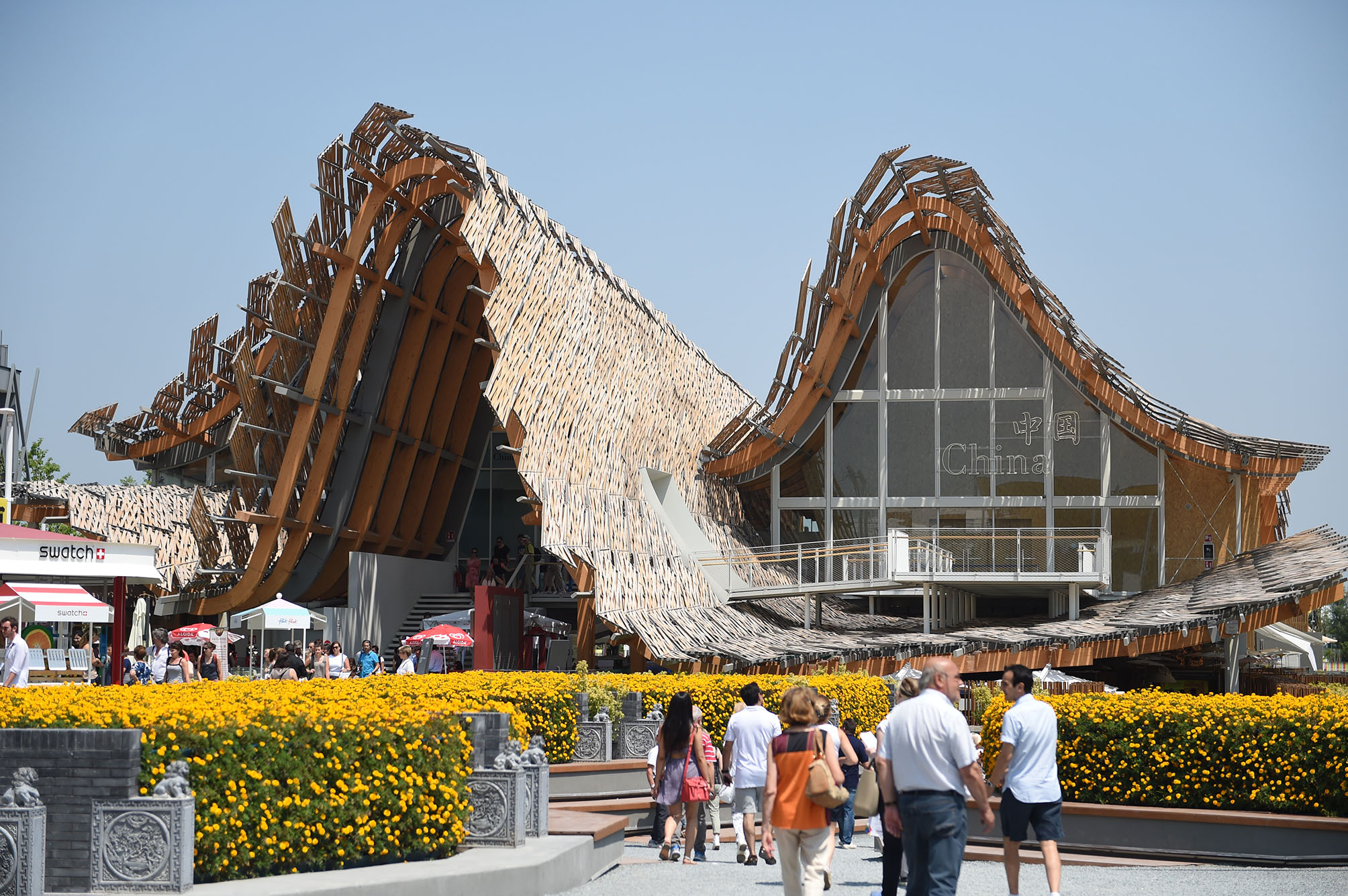 Expo Milano 2015, Pavilion of China